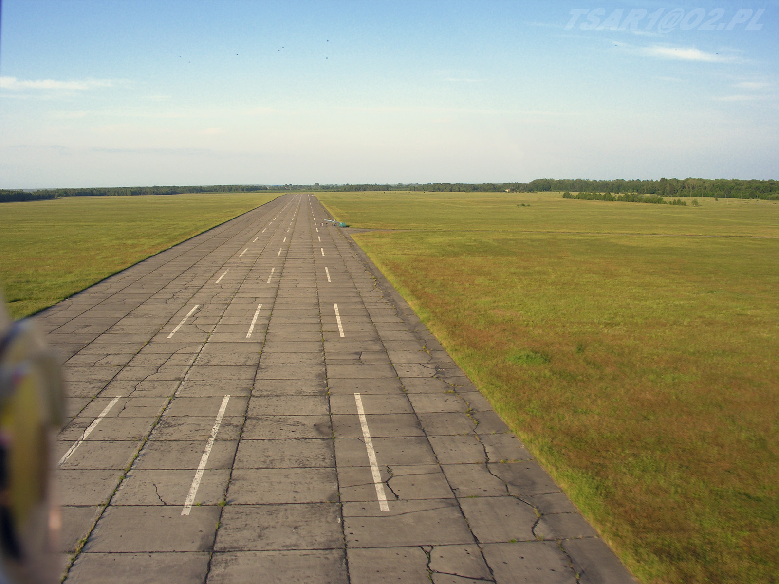 Lotnisko Nowe Miasto nad Pilicą - zdjęcie pasa startowego wykonane dnia 07.06.2007